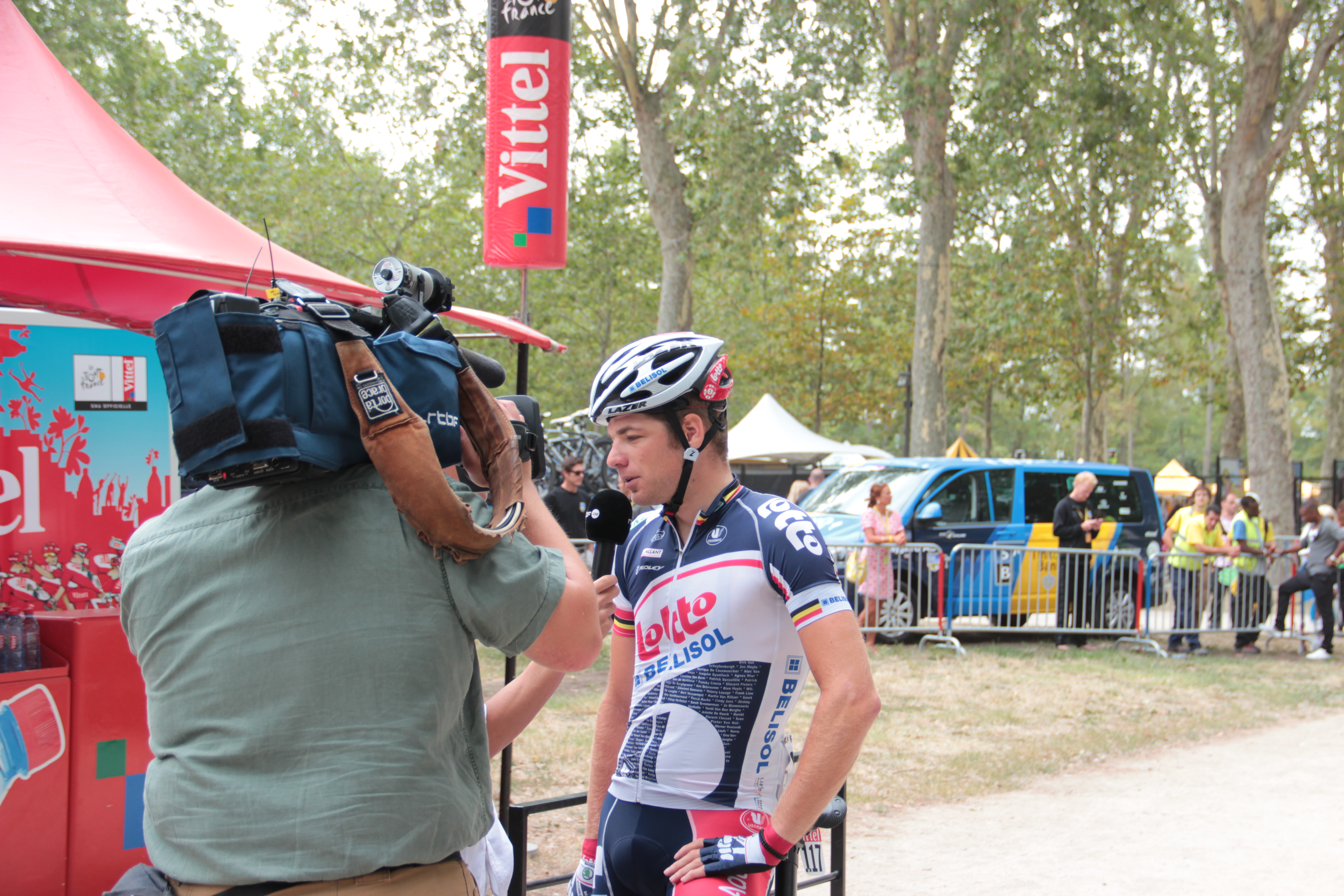 Jürgen Roelandts interviewé par la RTBF avant le départ de la 18e étape du Tour de France 2012.